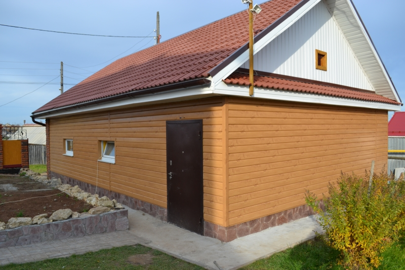 Облицовка здания стальным сайдингом, имитирующим бревно